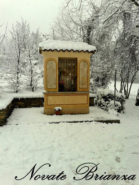 Piccola e antica edicola